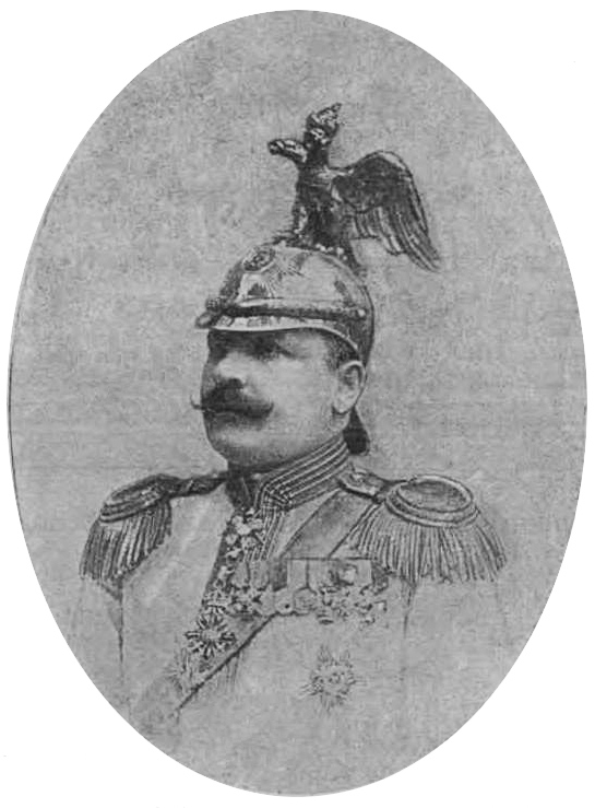 Полковник лейб-гвардии Конного полка Гусейн Хан Нахичеванский, 1904 год